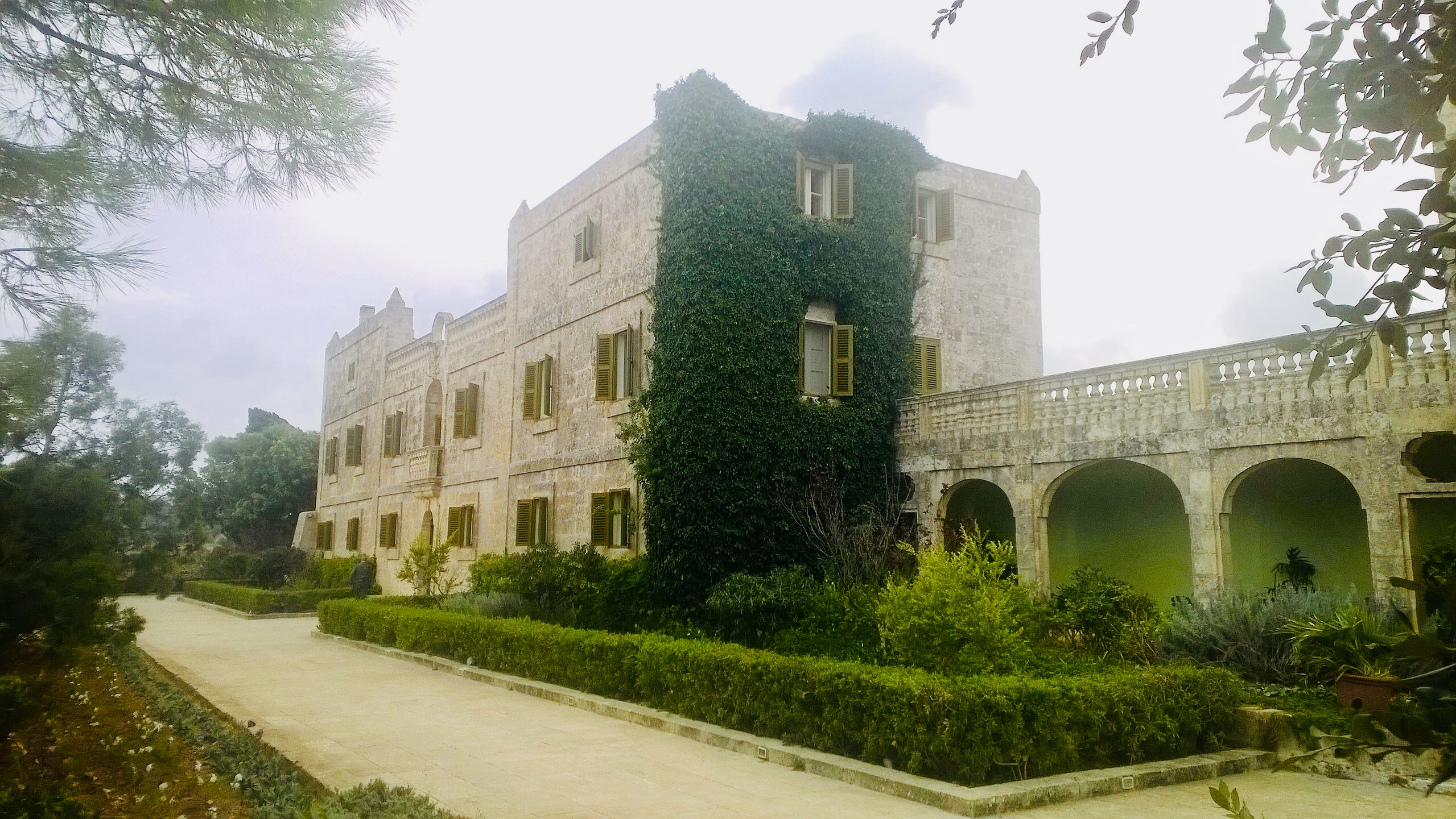 Il-Palazz tal-Girgenti